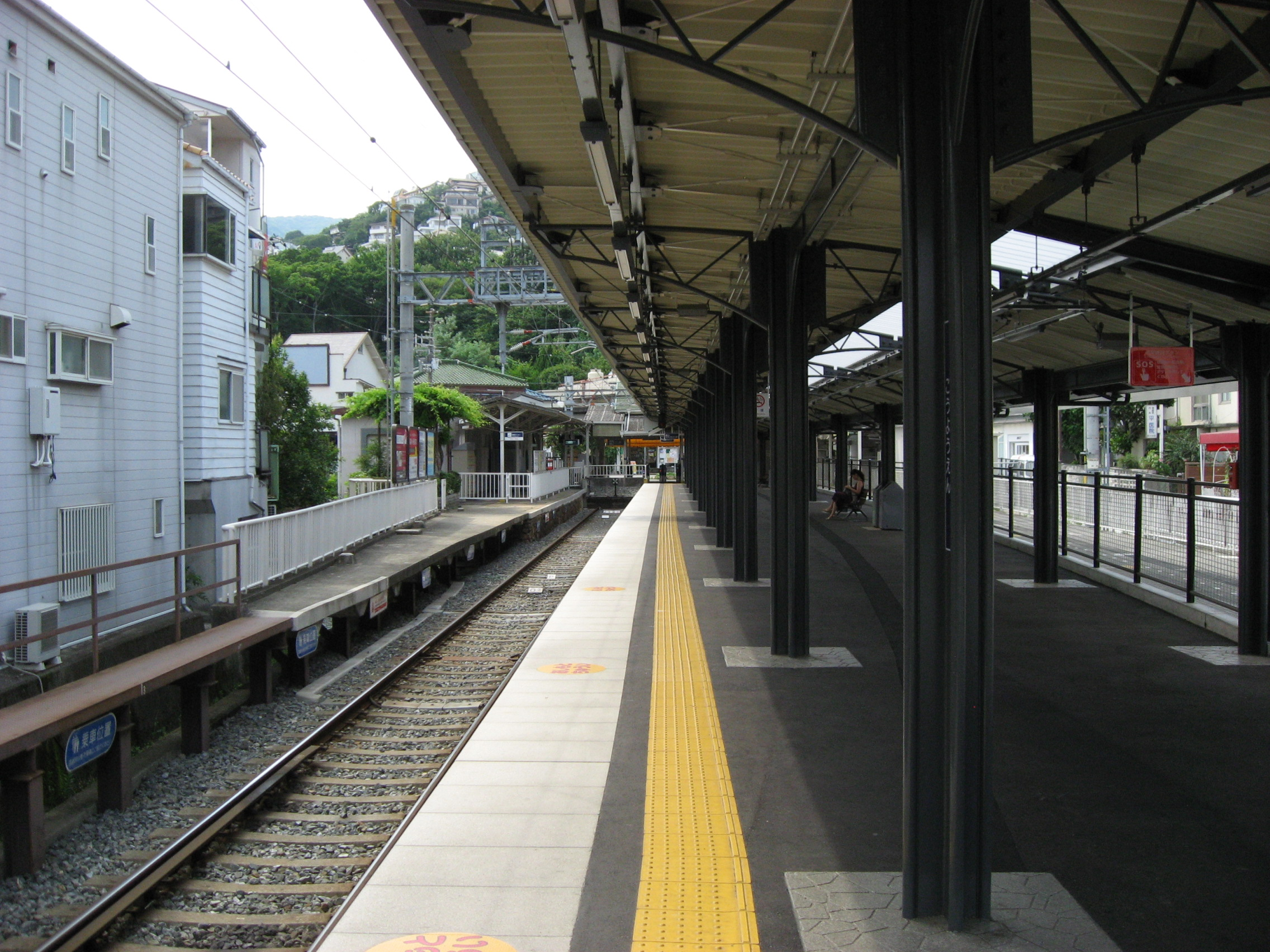 甲陽園駅ホーム